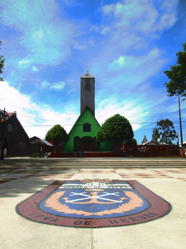 Iglesia de Curaco de Vélez con el escudo en la plaza.